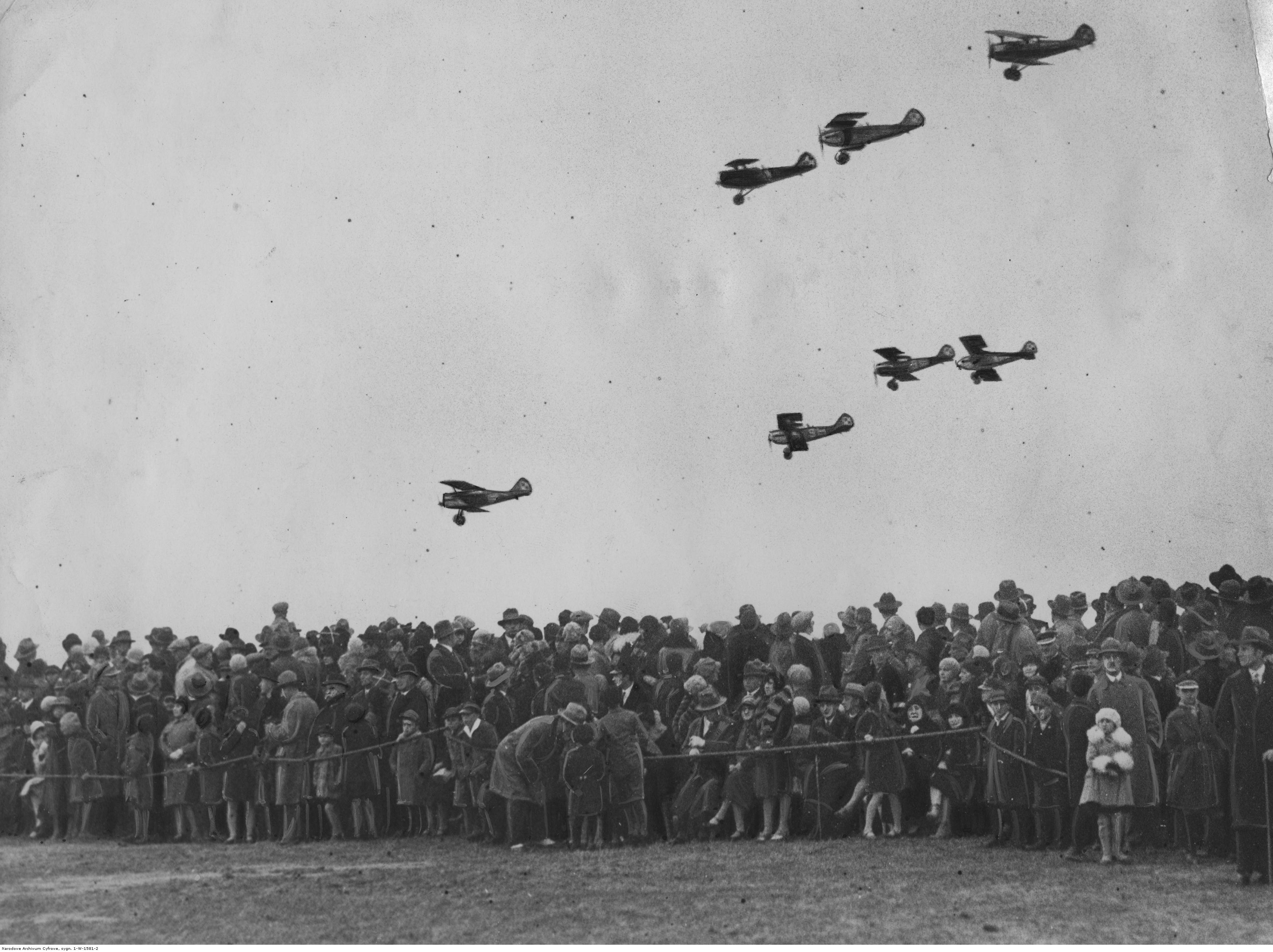 Pokazy lotnicze 3 pułku lotniczego w Ławicy. Koncern Ilustrowany Kurier Codzienny - Archiwum Ilustracji. Sygnatura: 1-W-1581-2